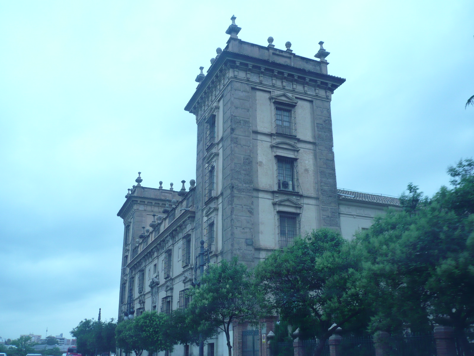 Museo Pio V y Real Academia de San Carlos de Valencia